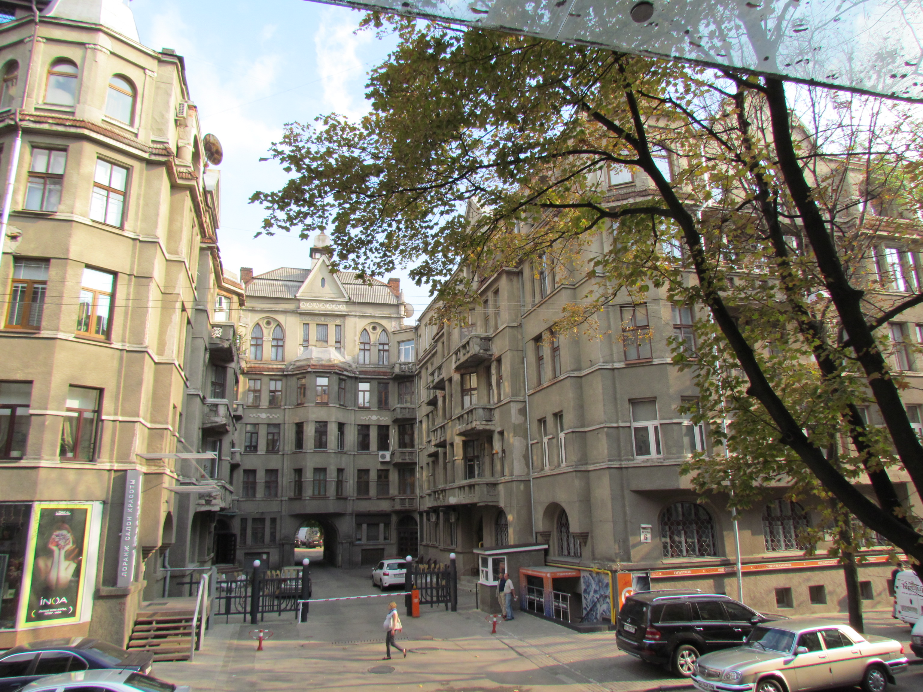 Україна, Харків, вул. Артема, 6